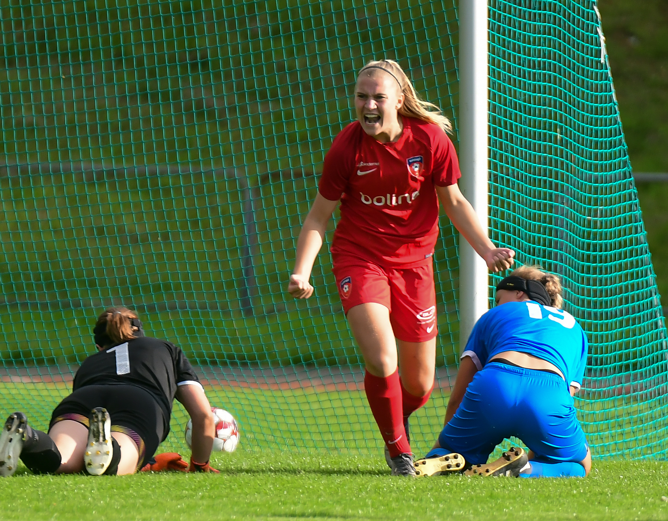 Sofie Thrane Hornemann